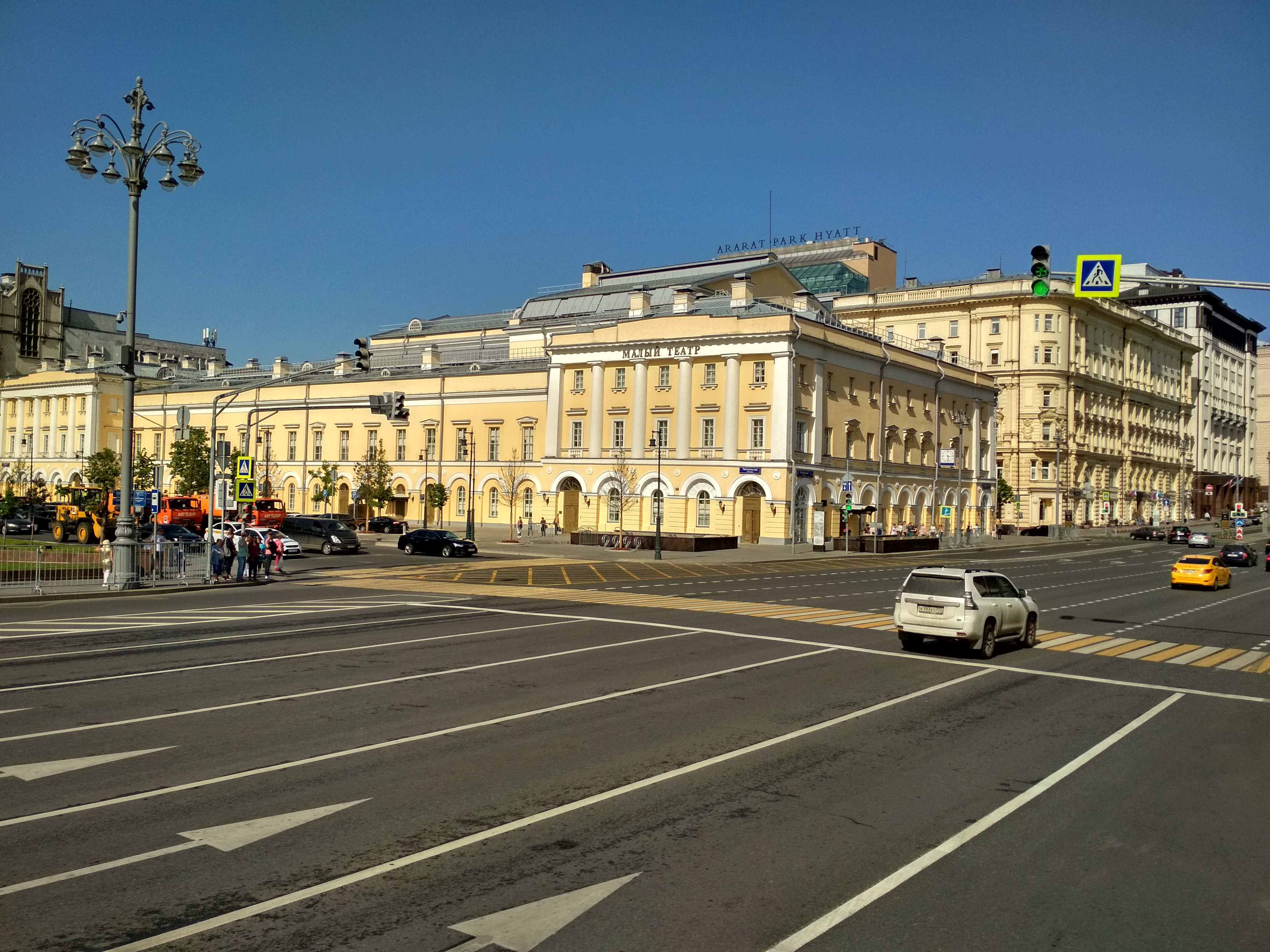 General view of the building of the Maly Theater. May 2018